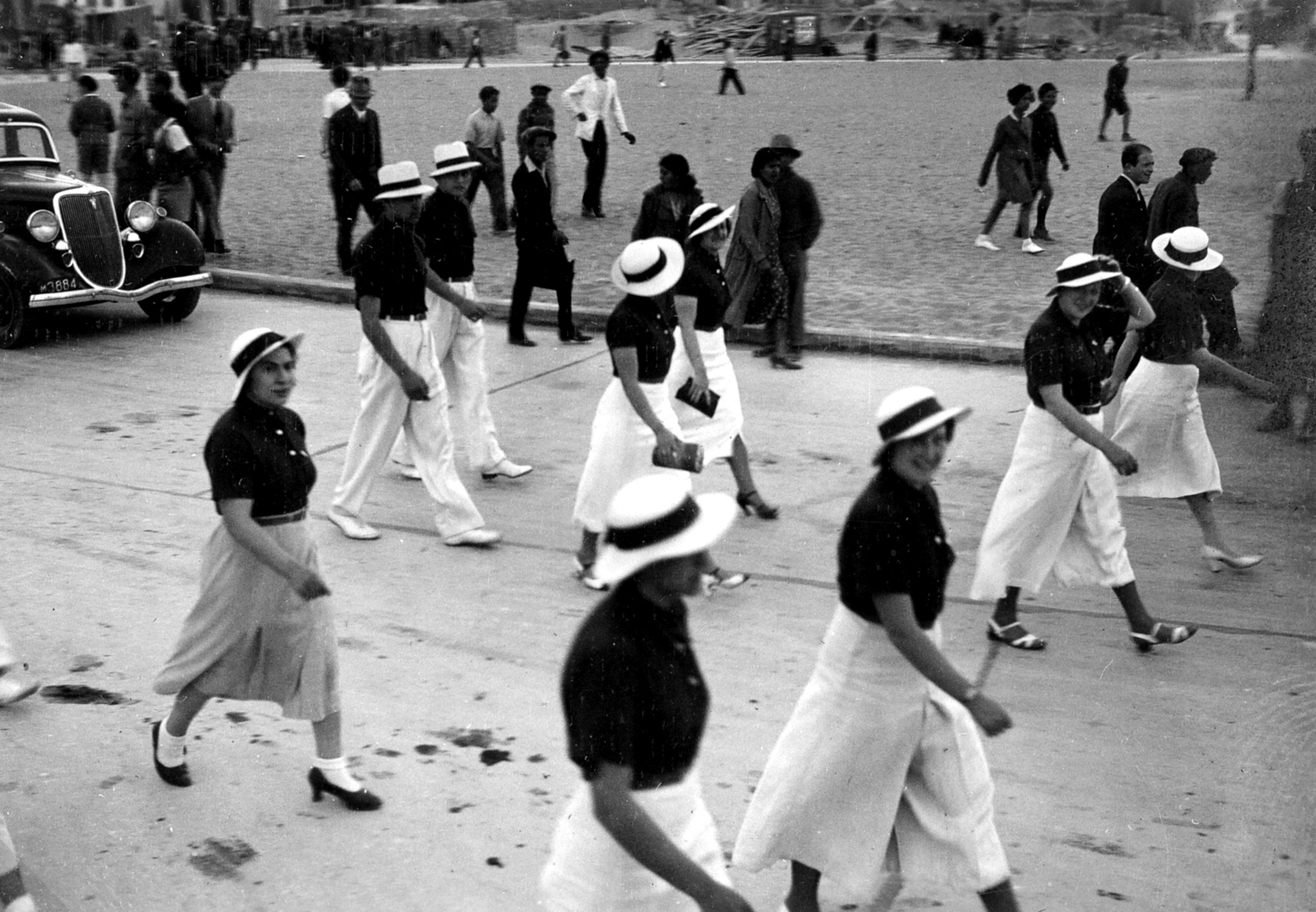 אוסף דוד עופר - המכביה השניה ; פריט מספר 55